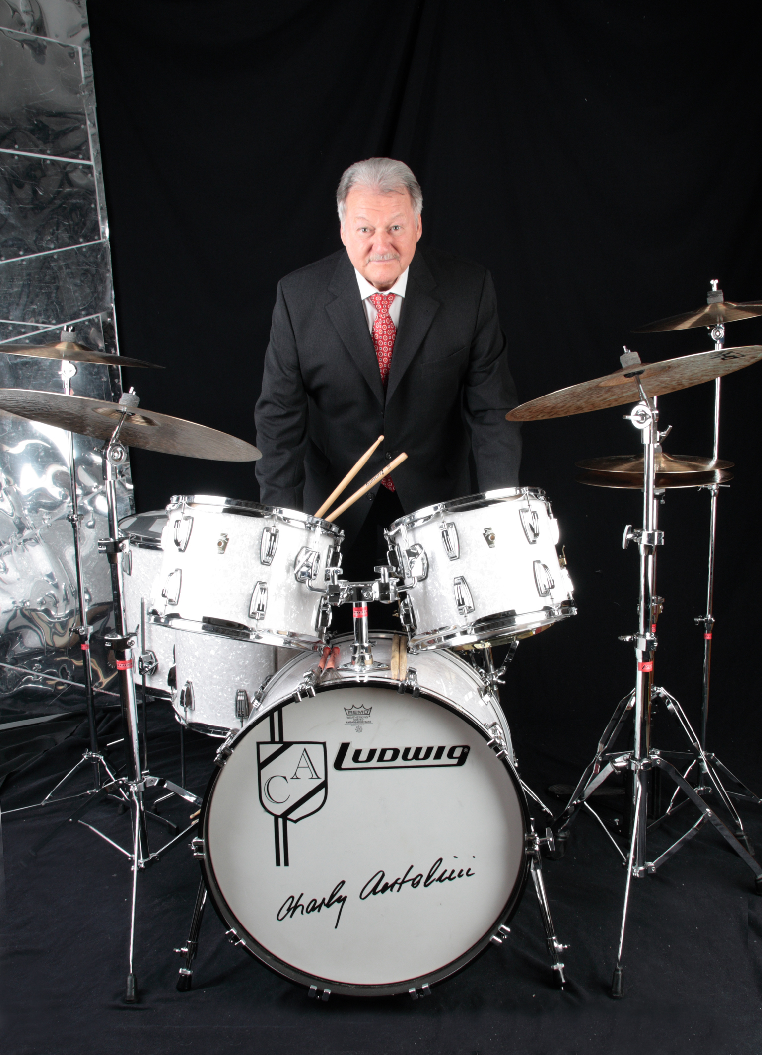 Charly Antolini im schwarzen Anzug.